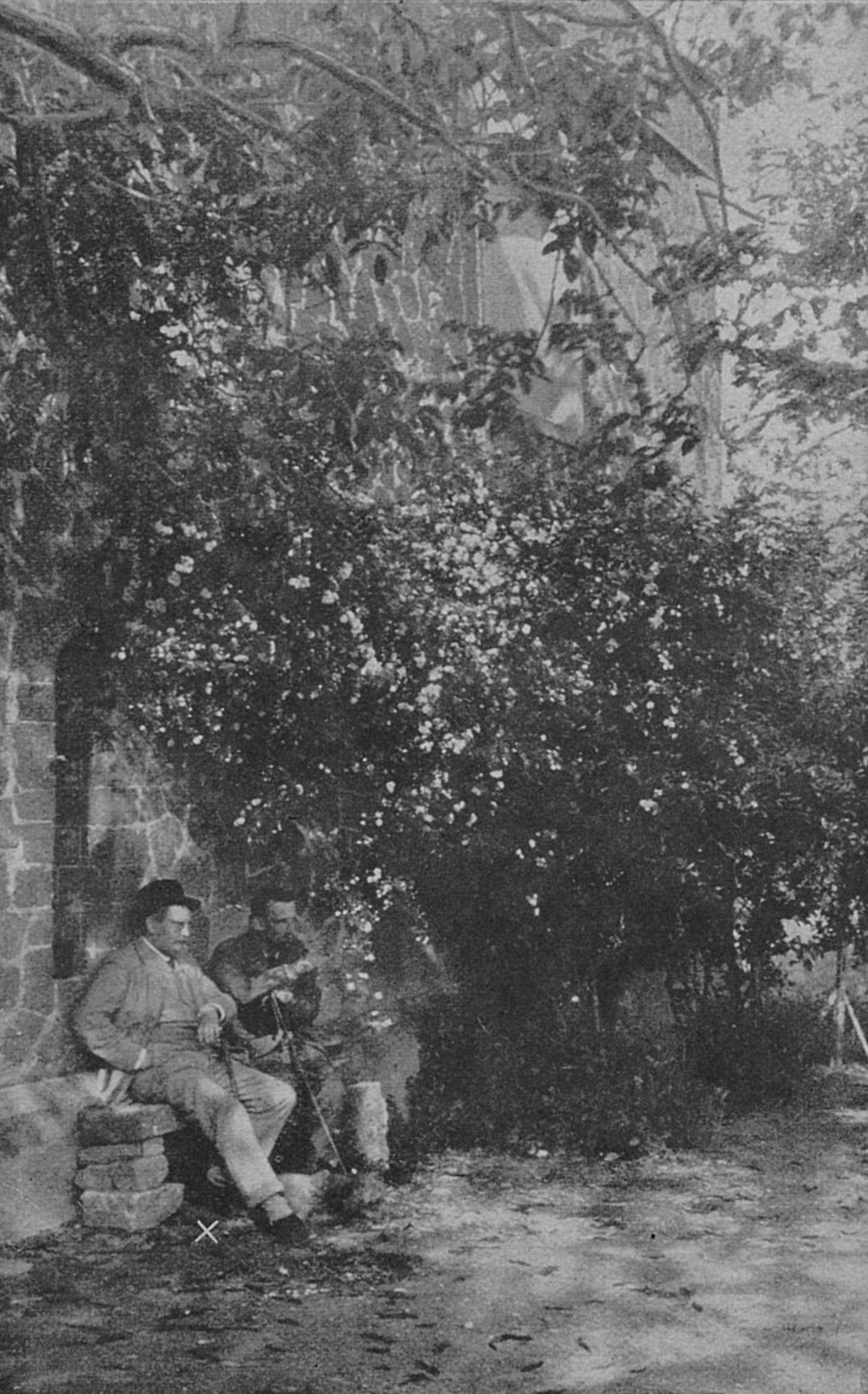 Zum 50. Geburtstag von Otto Erich Hartleben (gestorben am 11. Februar 1905) - der Dichter (x) in der Villa Strohl-Fern in Rom, neben ihm der Bildhauer Levy (Max Levi), um 1904